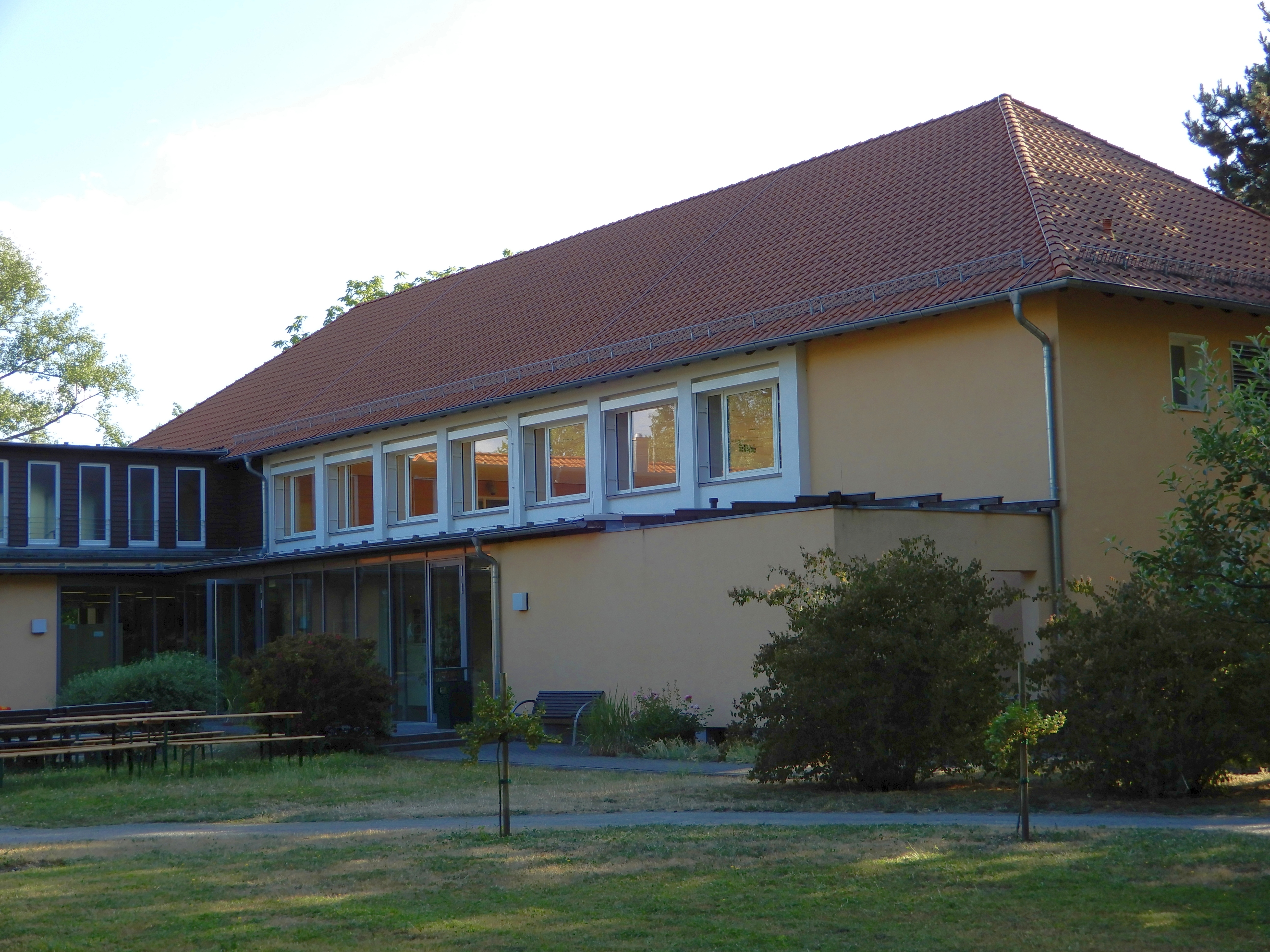 Gatersleben, IPK Correnstraße